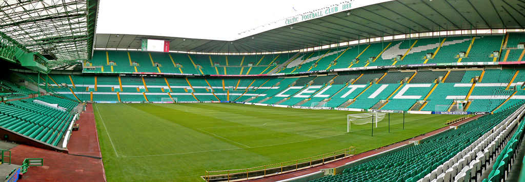 セルティックFCのホーム、セルティック・パーク. セルティック・パーク.